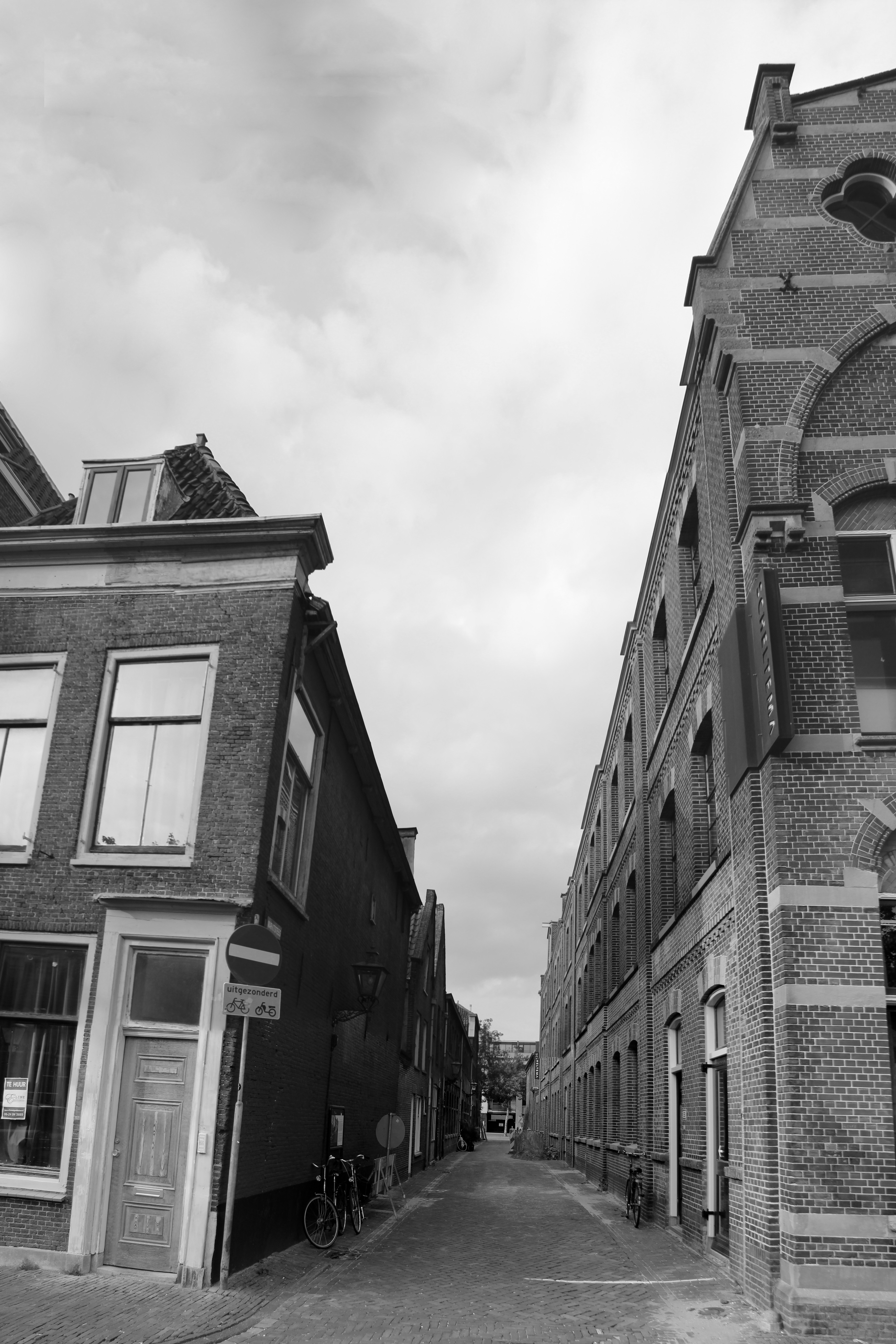 De Marktsteeg Leiden